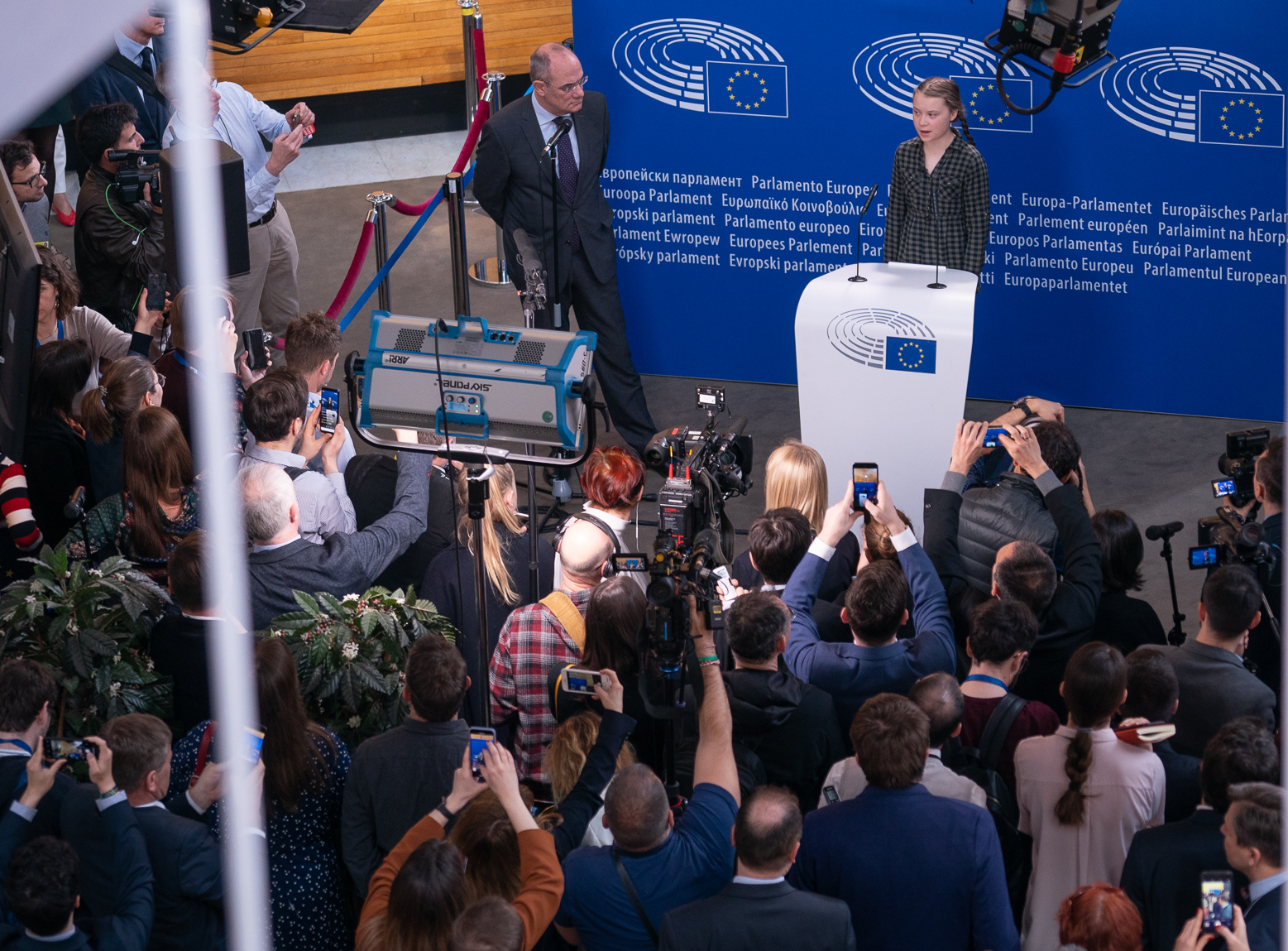 2019 france strasbourg EP EU political leader plenary session european union euroopaparlament europa parlamentet europas parlaments europe european citizens parliament europejski europeu parlamentul europos parlamentas europský europäisches parlament eurostudio európai ewropeweuropees parlaimintn aheorpa euroopan parlamente vropski parlamentil parlamento europeo parlamentti parlamentet parlement européen Parlaimint na hEorpa SONY ALPHA 9